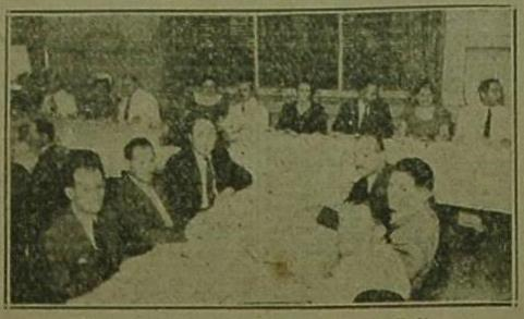 Banquete organizado por la Organización Israelita Argentina realizado el 30 de marzo de 1949 en el Salón Sionista de Santa Fe, festejando el reconocimiento de Israel por parte de la Argentina.